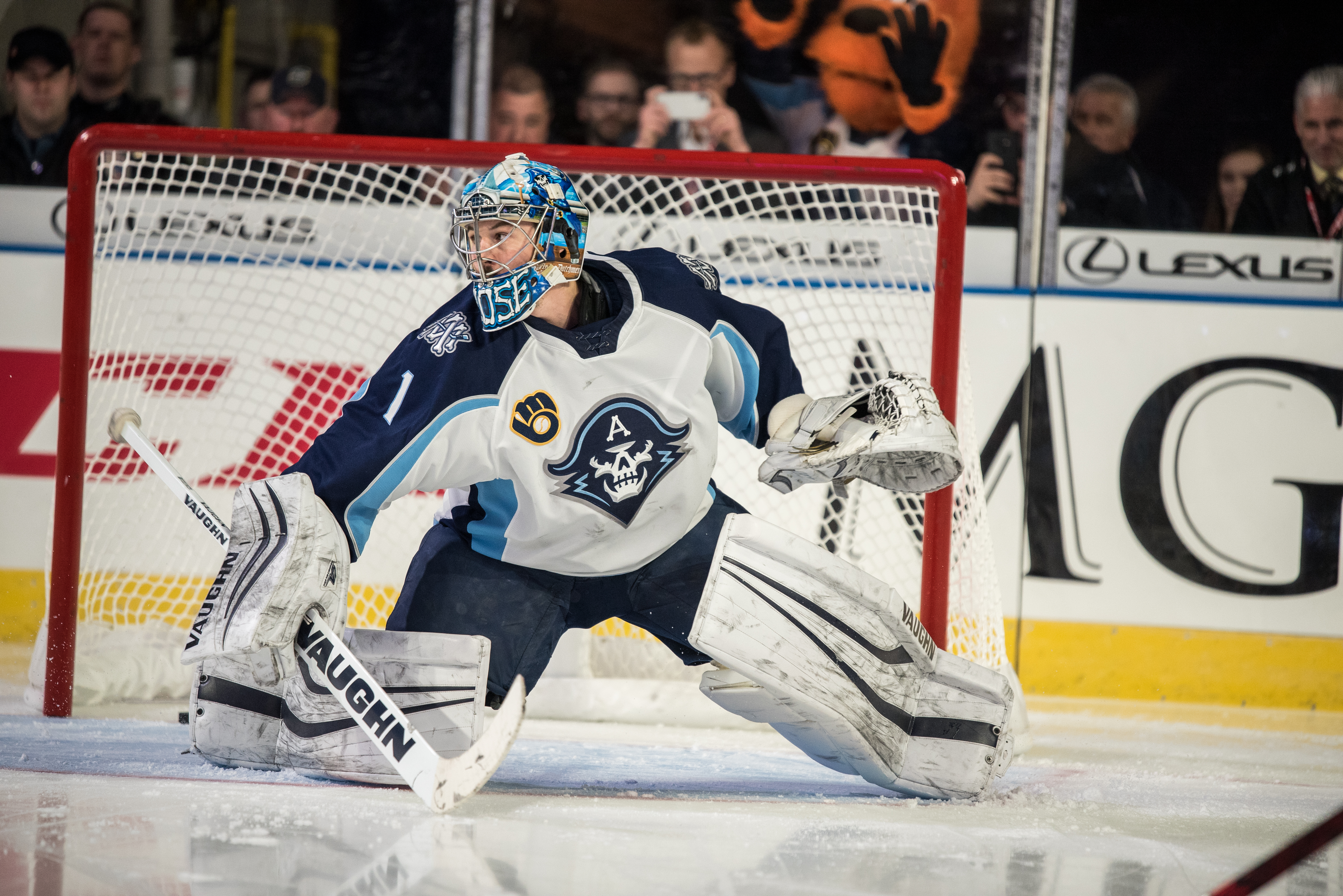 CYW_1547